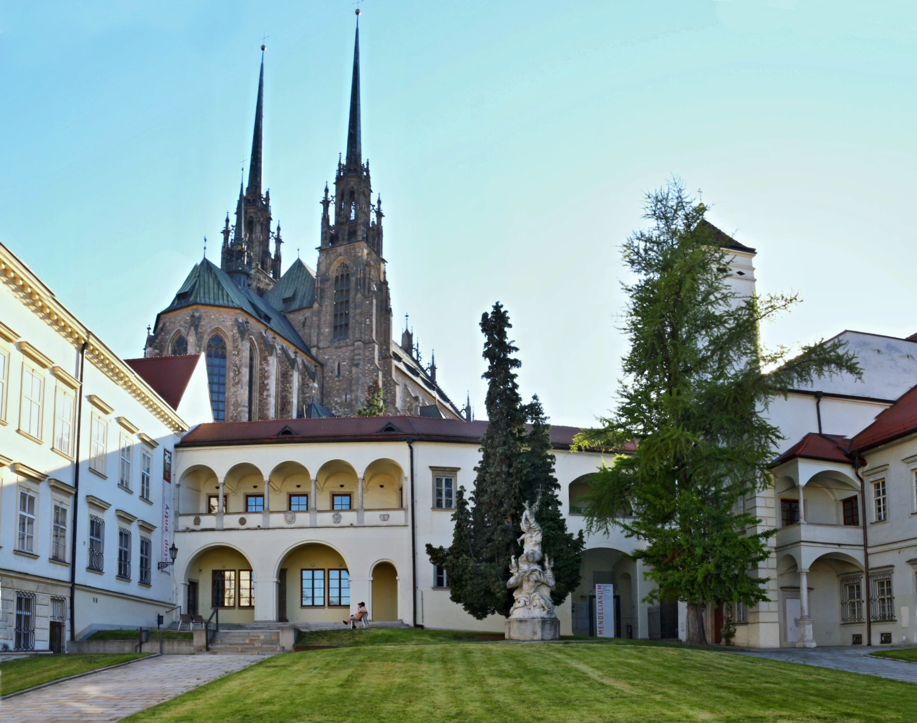 Brno Biskupský dvůr